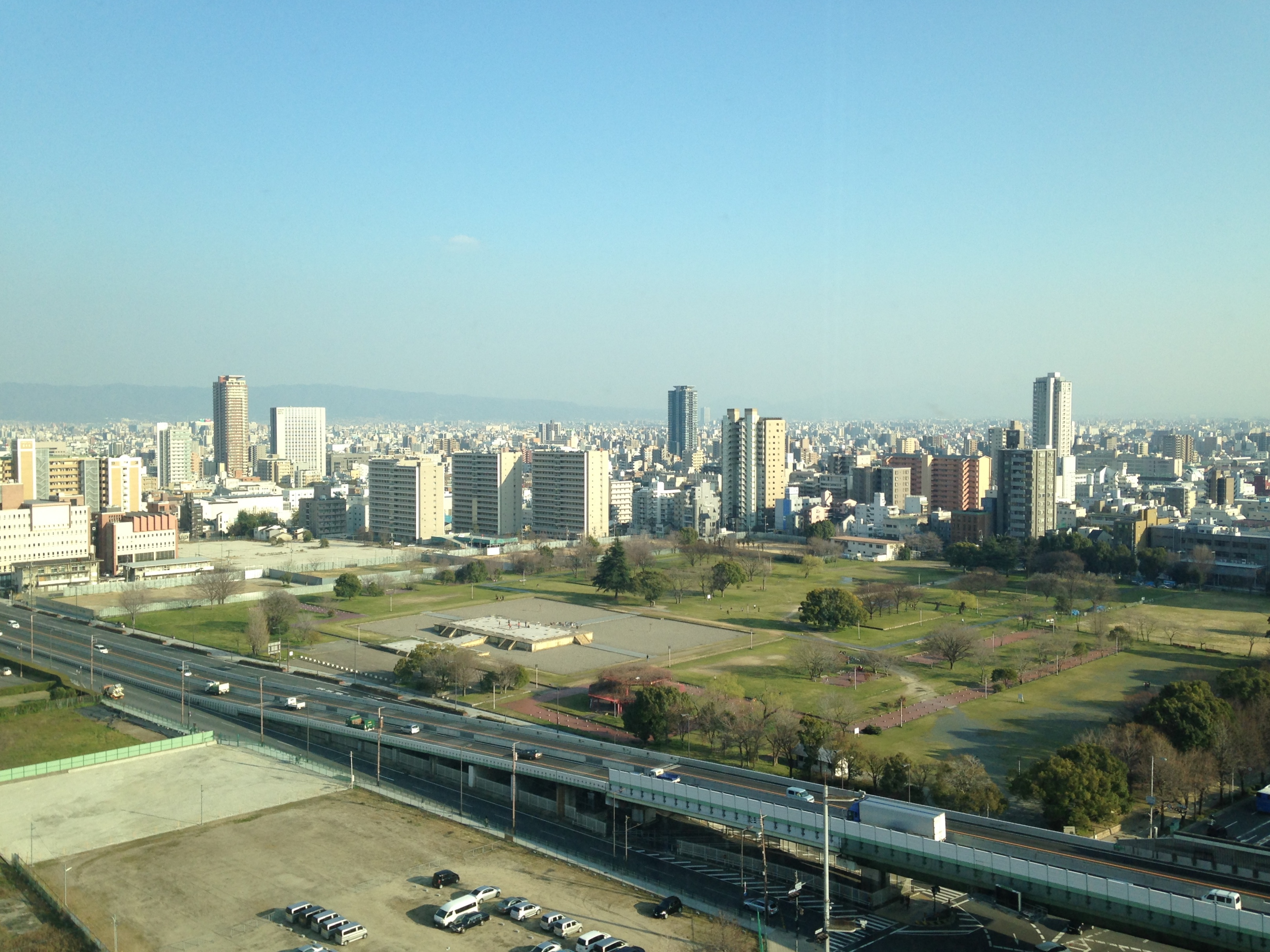 大阪歴史博物館10階より望む難波宮公園